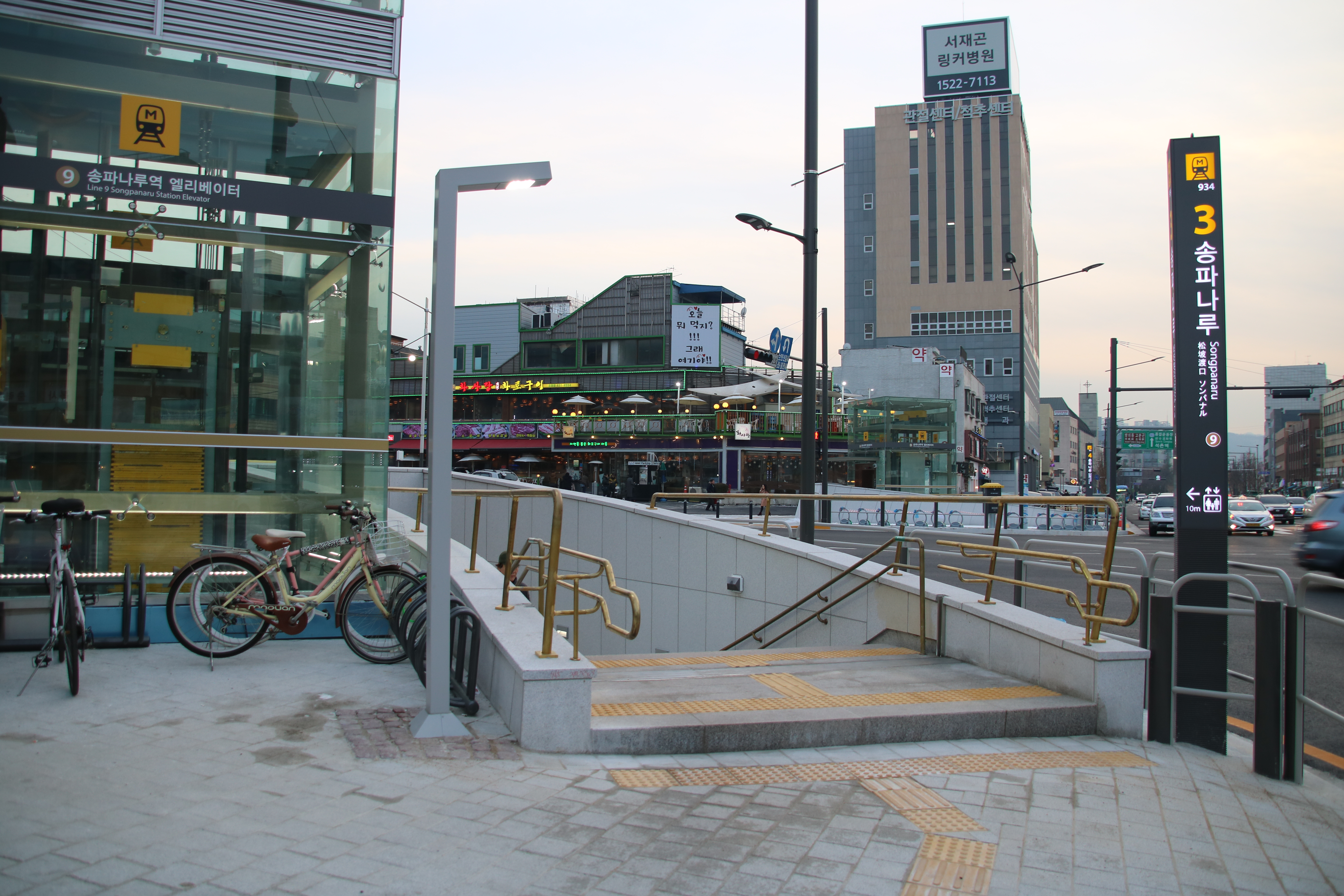 송파나루역 3번 출입구